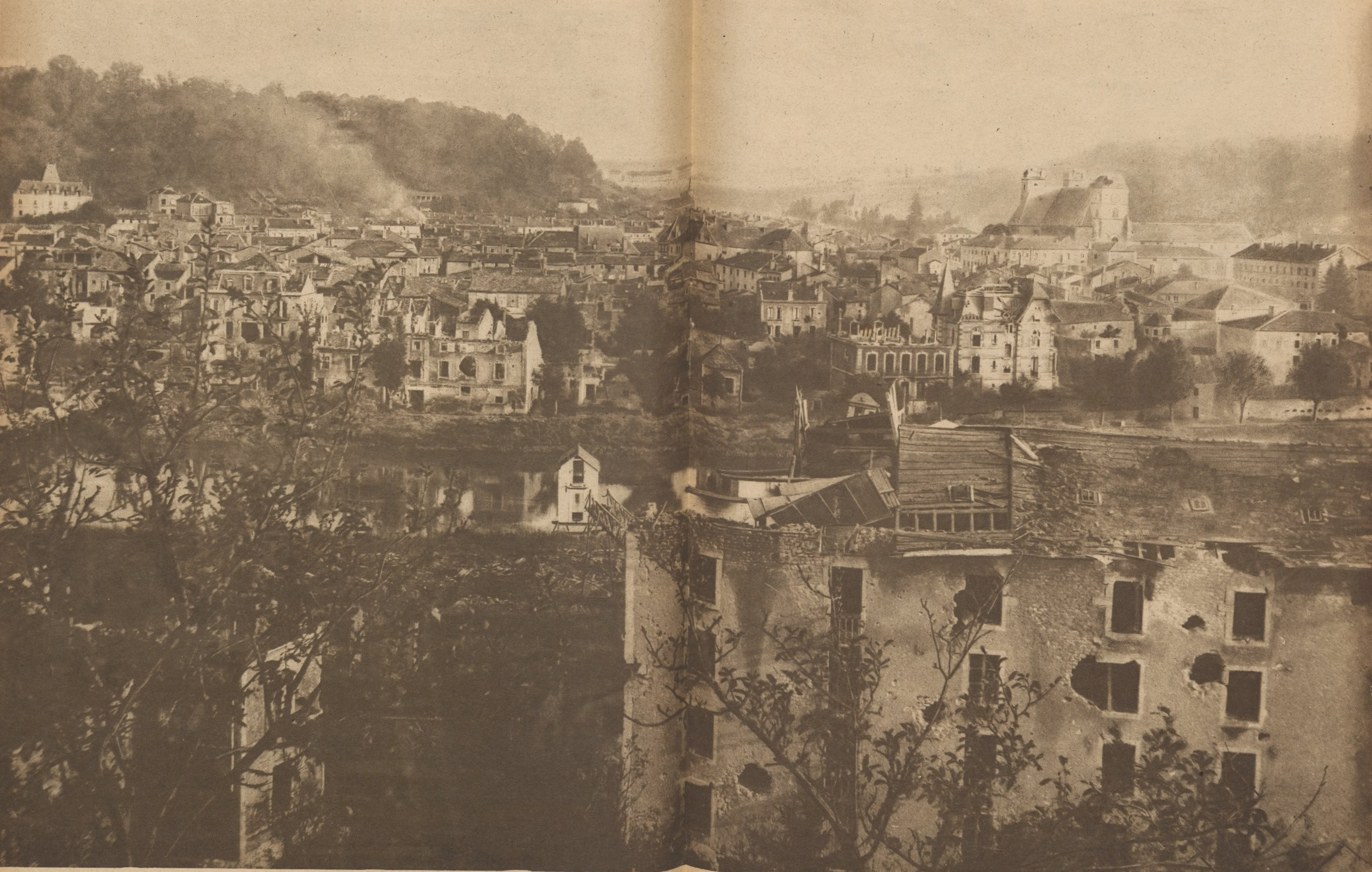 Hebdomadaire Le Miroir N° 253, page 9, Saint-Mihiel vue des tranchées allemandes en septembre 1918, photographie prise par un officier autrichien.